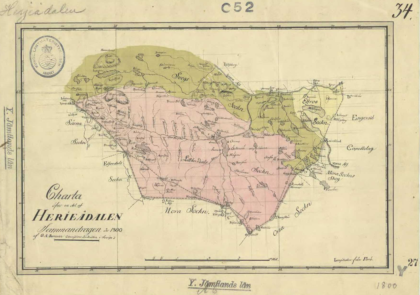 "Karta över Härjedalen" som bara visar de sydligaste delarna av Härjedalen. Funäsdalen, exempelvis, är inte med.